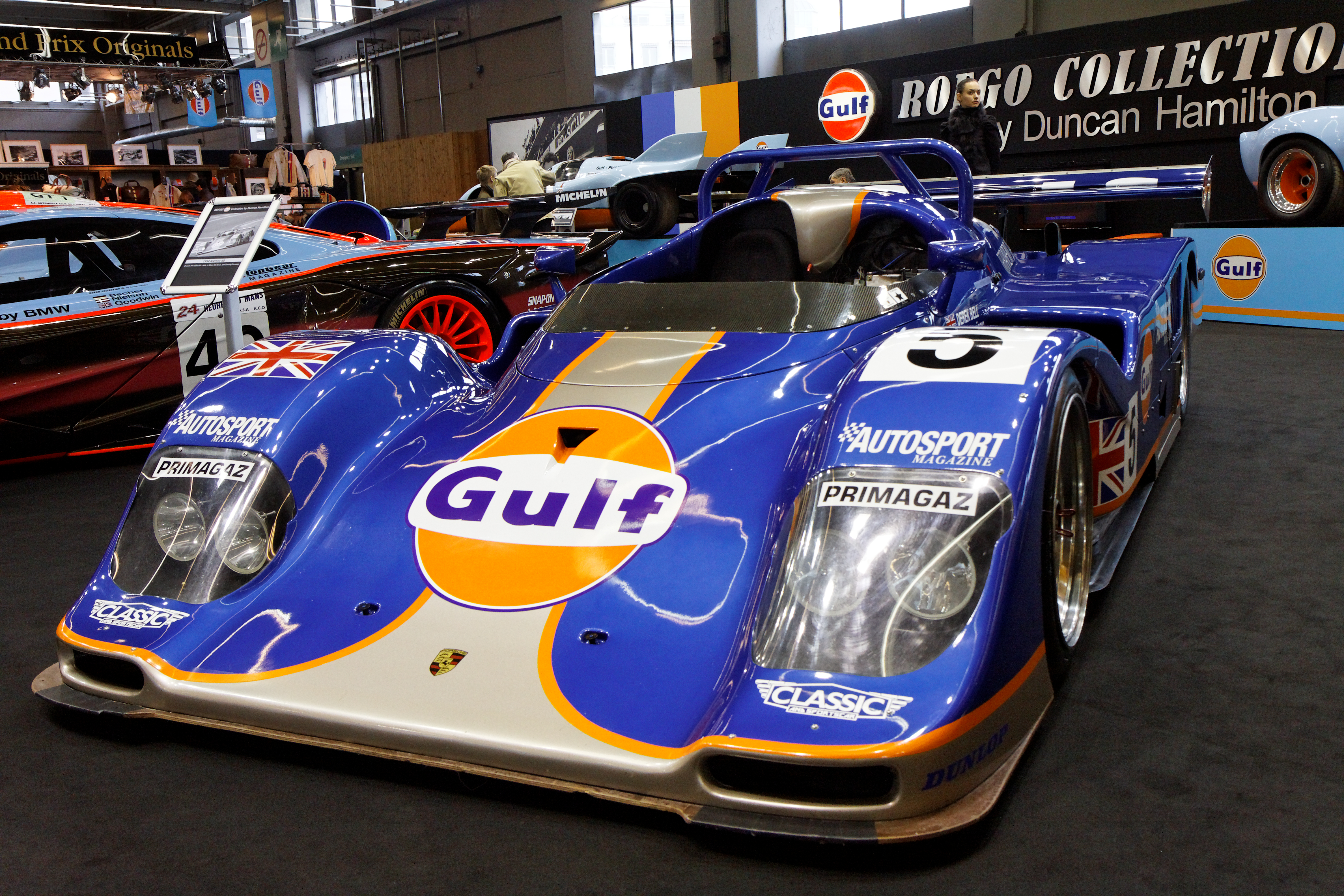 Photographie prise lors du salon rétromobile 2011 à Paris, porte de Versailles.